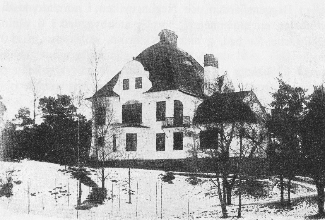 Klas Fåhraeus villa från 1898 (även kallad "Gröna udden") i Saltsjöbaden, arkitekt Gustaf Wickman (numera riven)